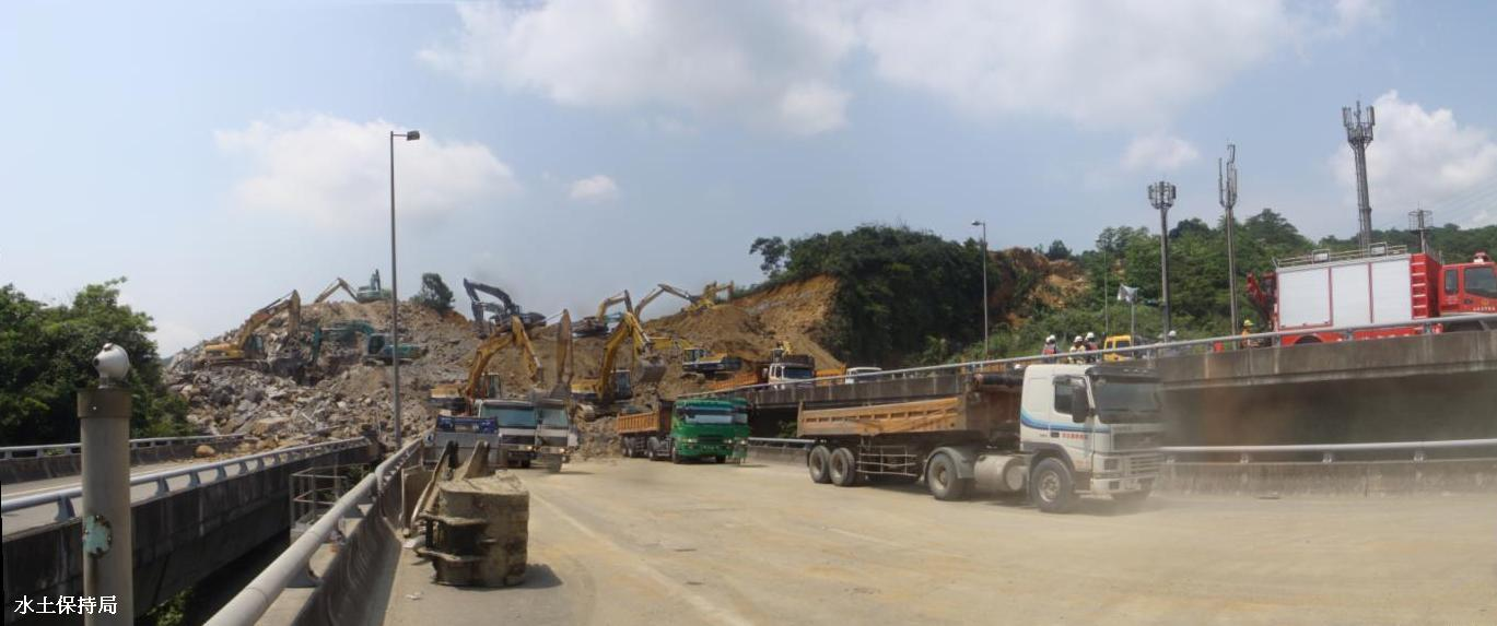 2010年福爾摩沙高速公路發生山崩，災區北側全景